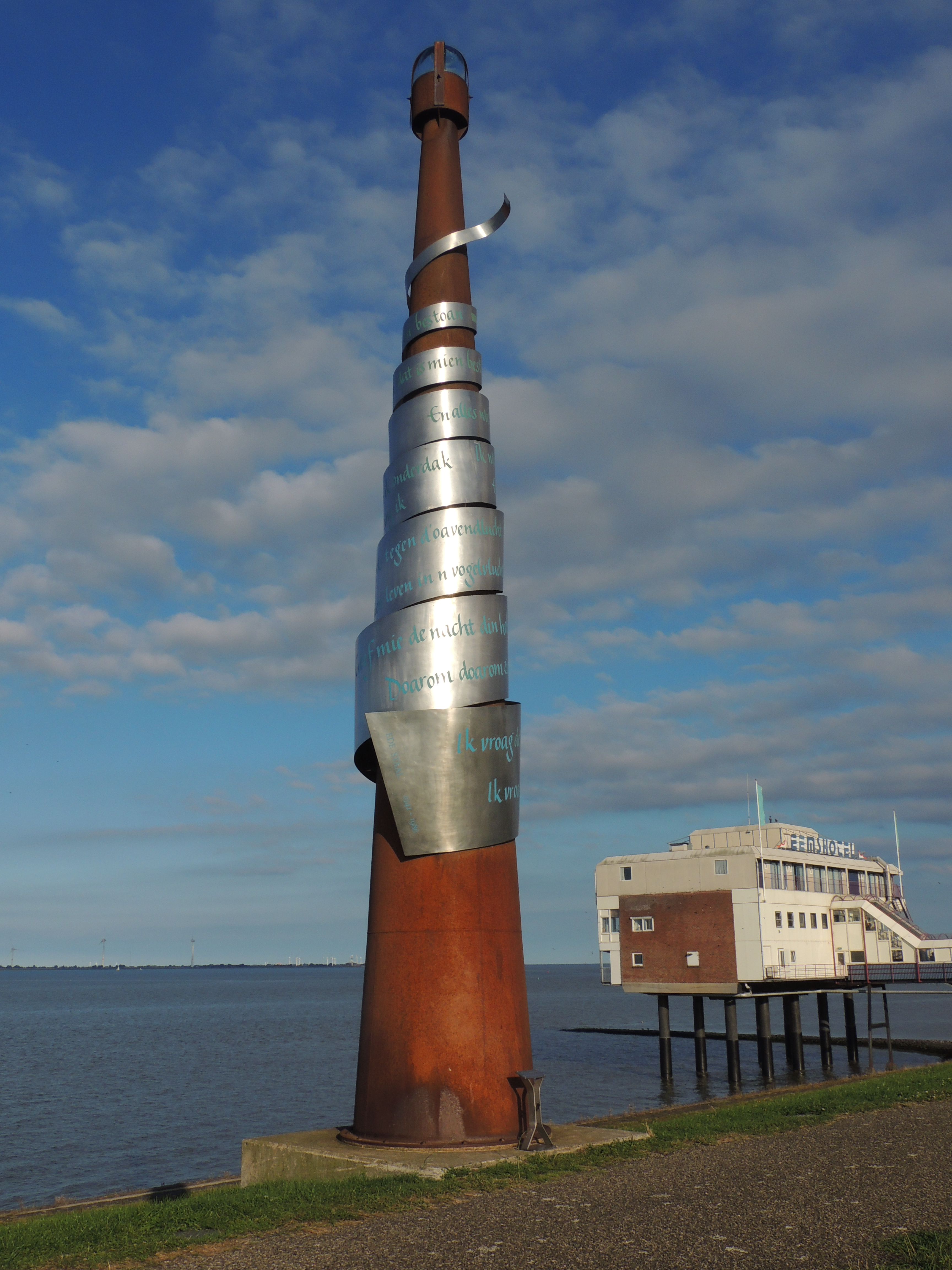 Monument van Staal, voor Ede op de dijk . Delfzijl.